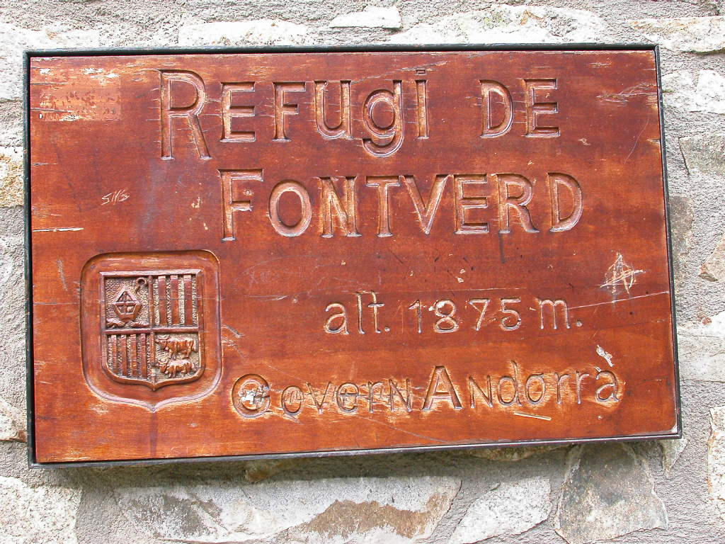 Refuges Andorre